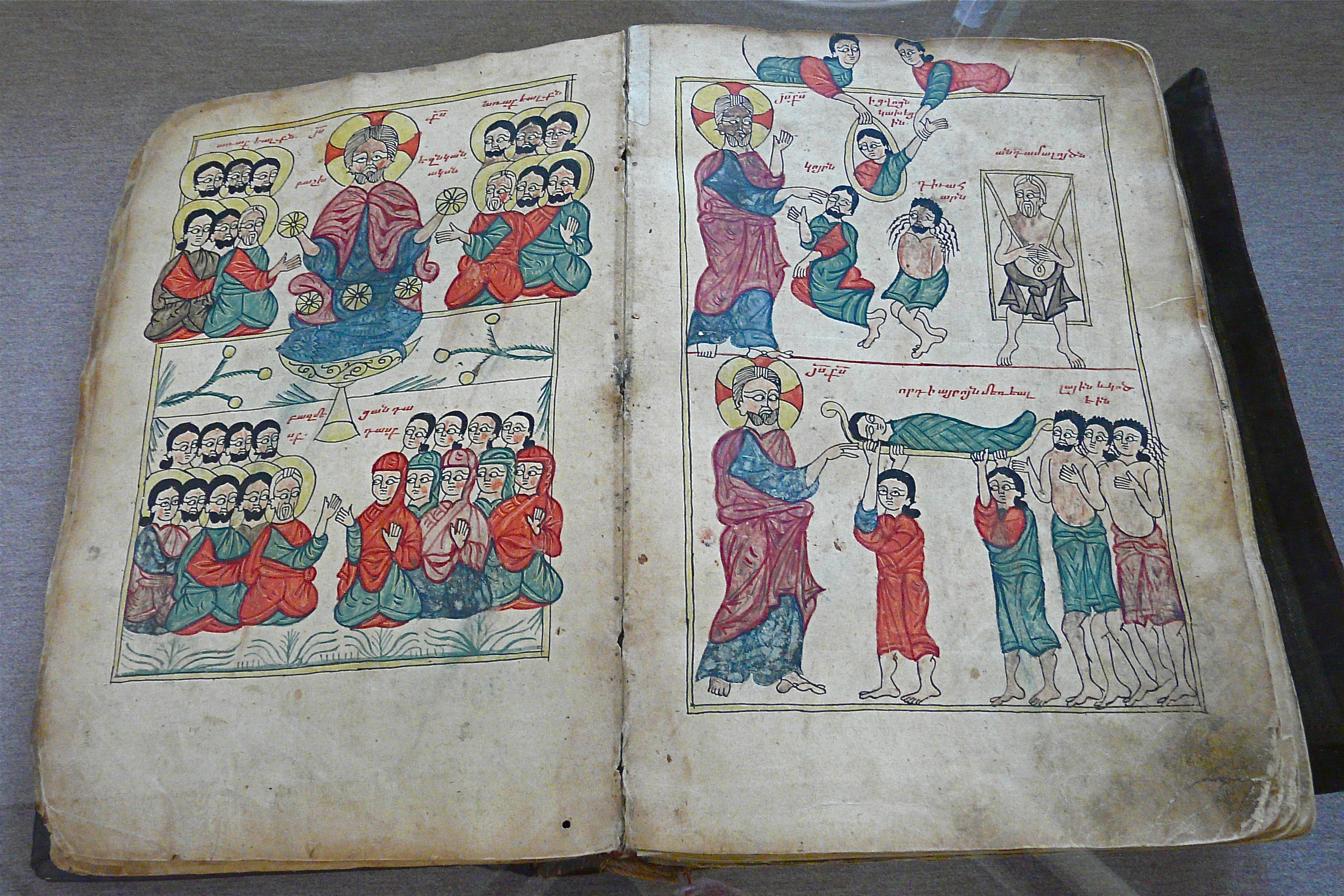 Matenadaran - Het manuscriptenmuseum. Voor het museum bevindt zich een standbeeld van Mesrop Mashtots, de ontwerper van het Armeens alfabet. Het museum herbergt 16000 oude en verlichte manuscripten. Het oudste "Het evangelie van Lazarus" uit 887. Het grootste: 34 kg wegend en gemaakt van 700 koeievellen en tevens het kleinste evangelie: 12 gram wegend en 3x4cm groot. Zie ook